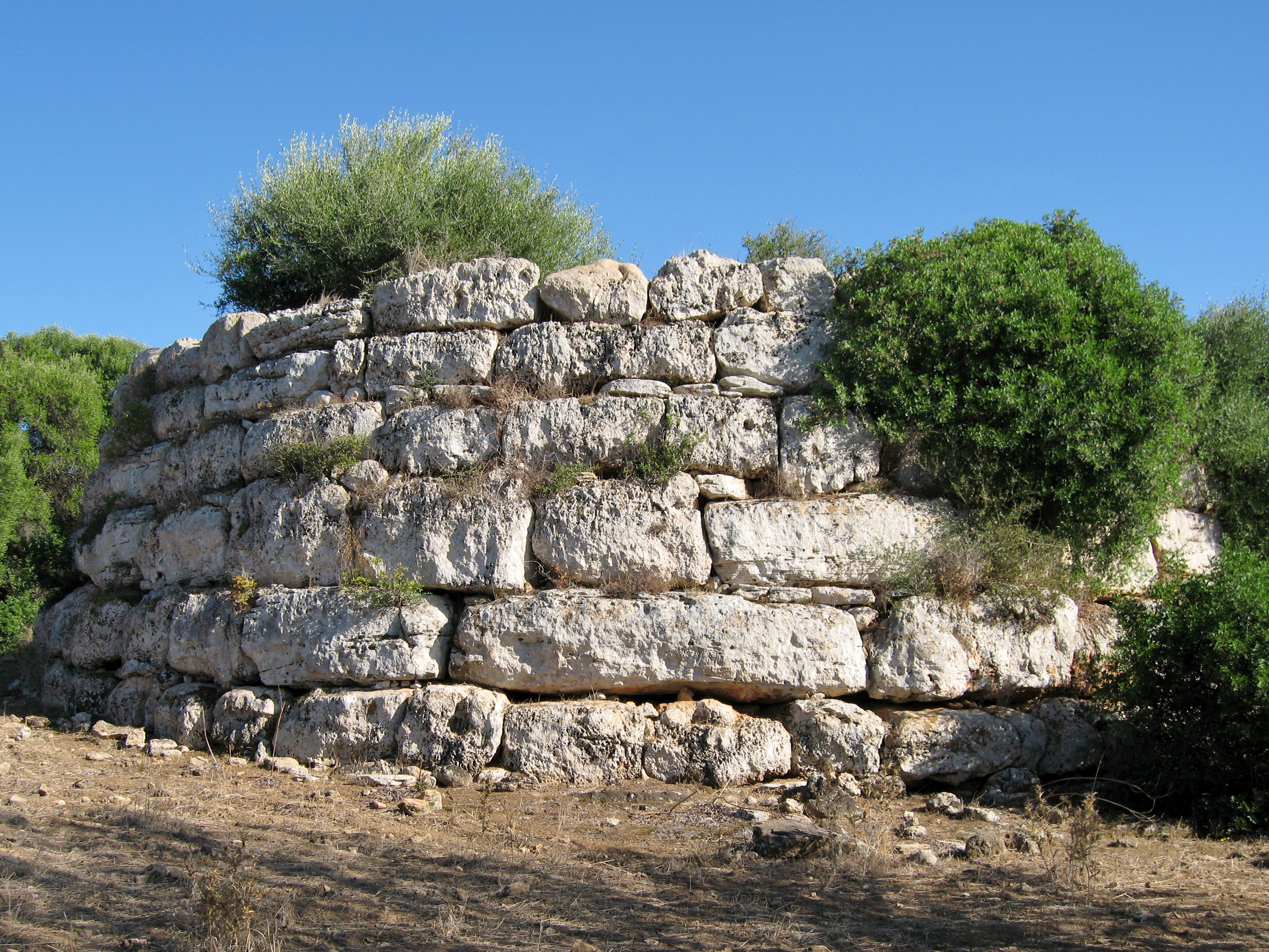 Runder Talayot sa Clova des Xot (Talaiot de sa Canova) auf dem Landgut sa Canova de Morell in der Gemeinde Artà, Mallorca, Spanien